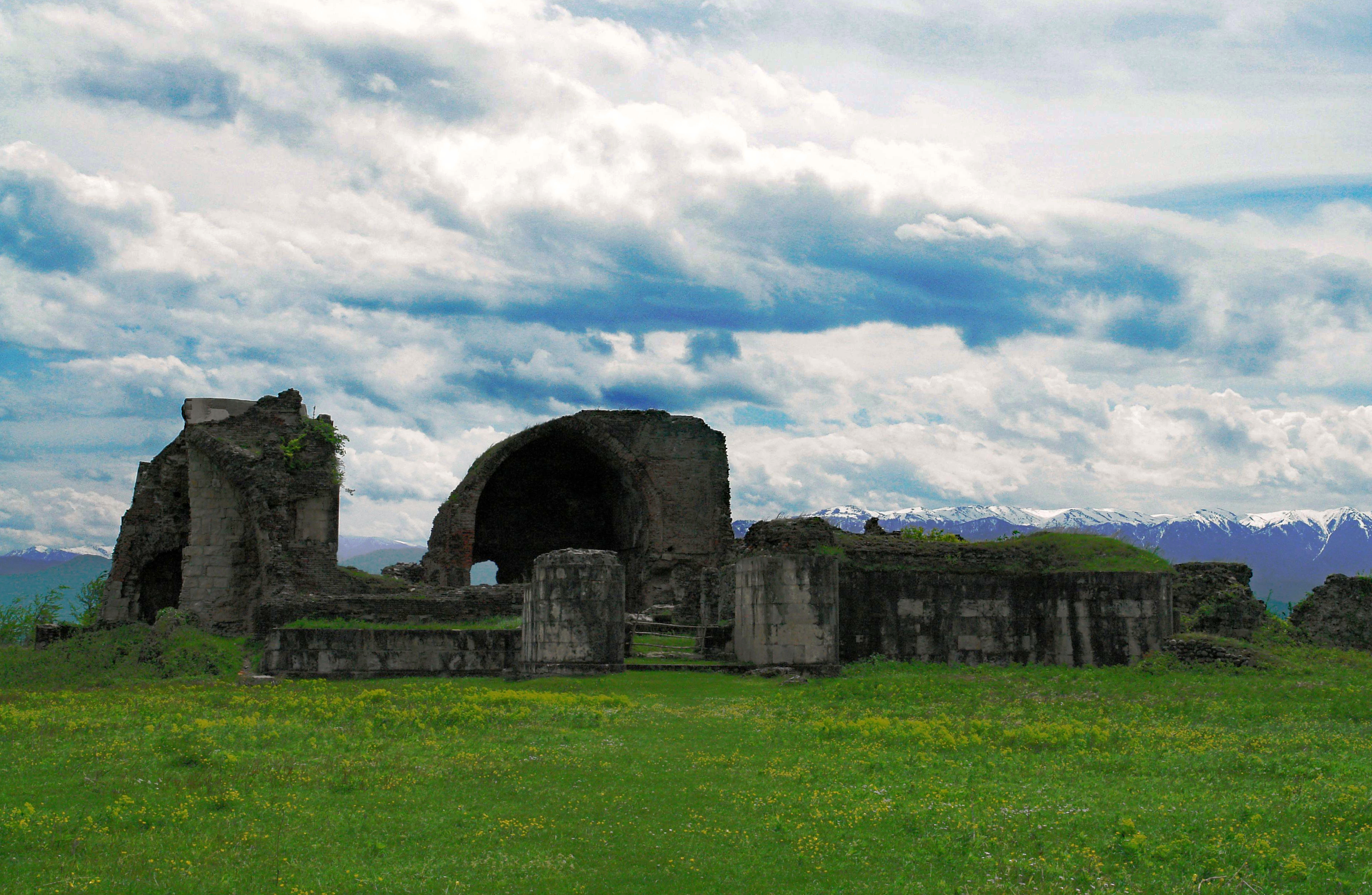 გეგუთის სასახლე - სხვა ნაგებობანი